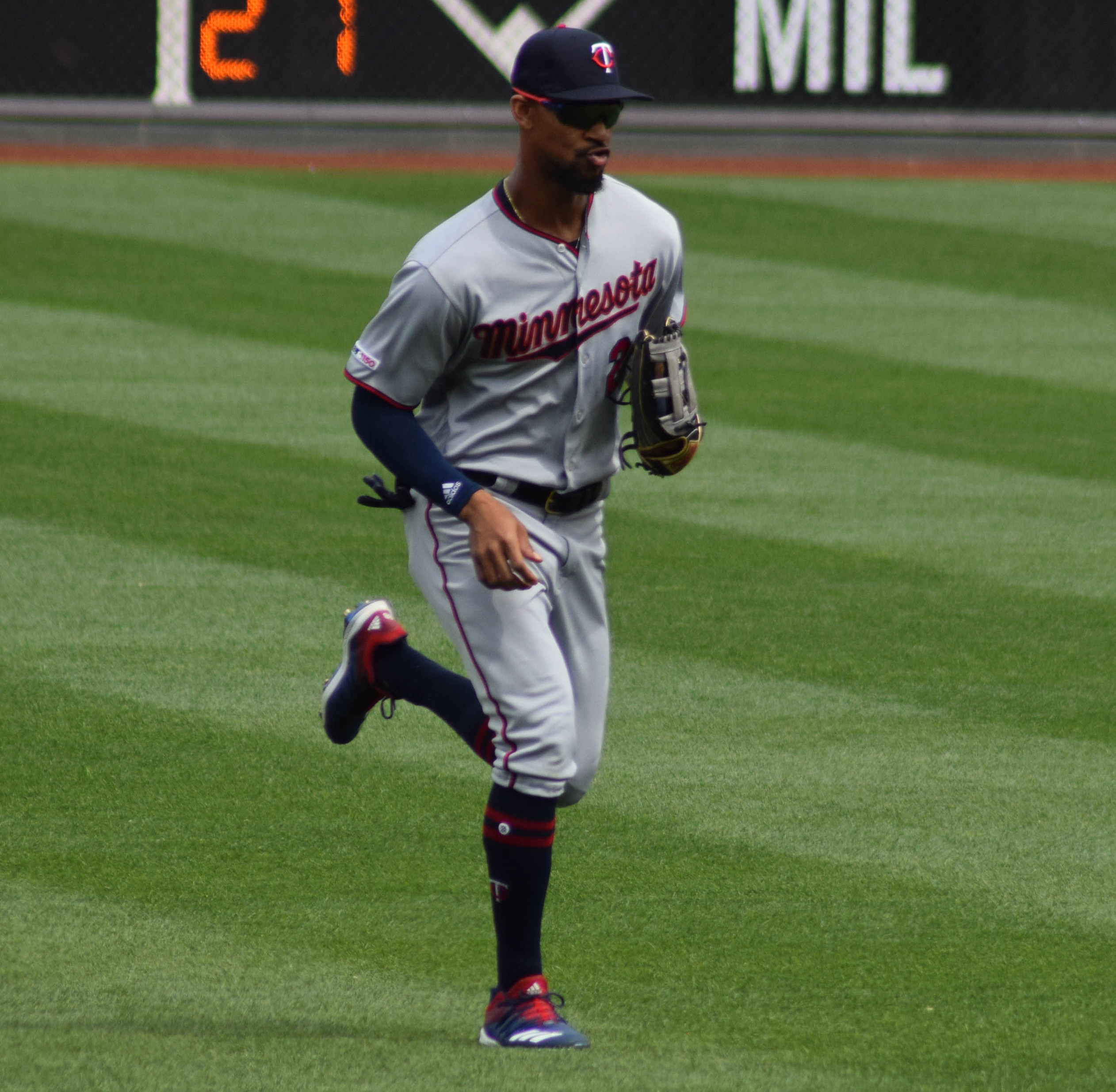 Byron Buxton